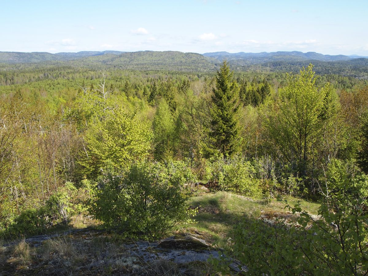 I Flisefyr-Hidalen er det registrert 17 ulike treslag.